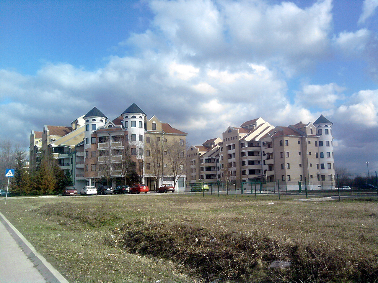 Зграде у хемограду